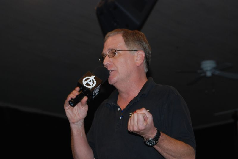 Bill Behrens